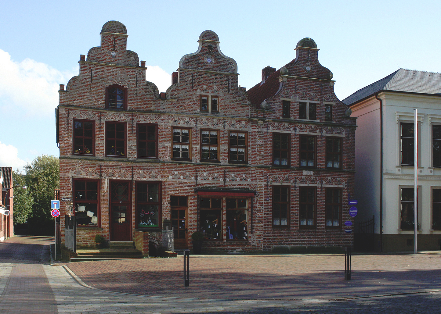 Die "Dree Süsters", ein Häuserensemble am Marktplatz von Norden (Ostfriesland) im Jahr 2007